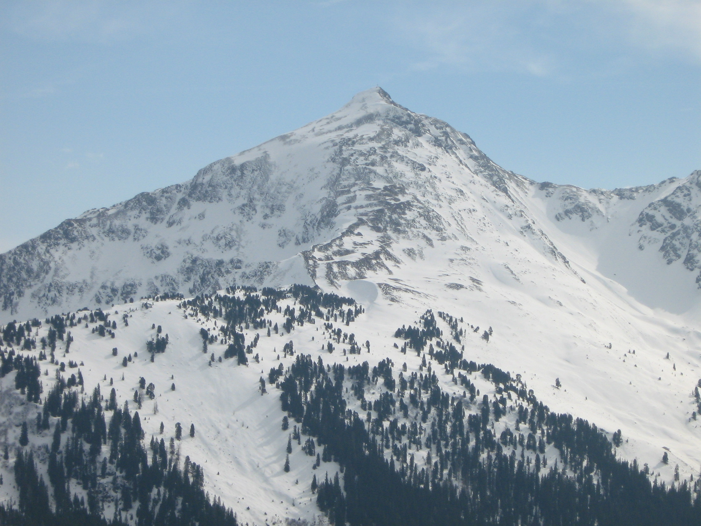 Der Große Galtenberg im Alpbachtal, Tirol.